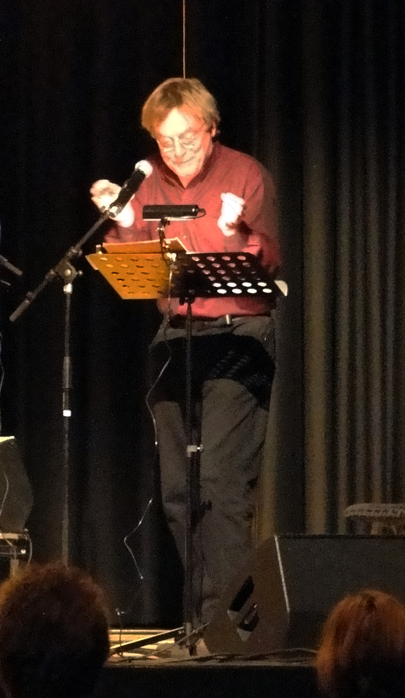 Dietmar Mues rezitiert Texte zur Musik des" Ekkehard-Jost-Oktetts", auf dem Hofheimer Jazz Festival 2009.